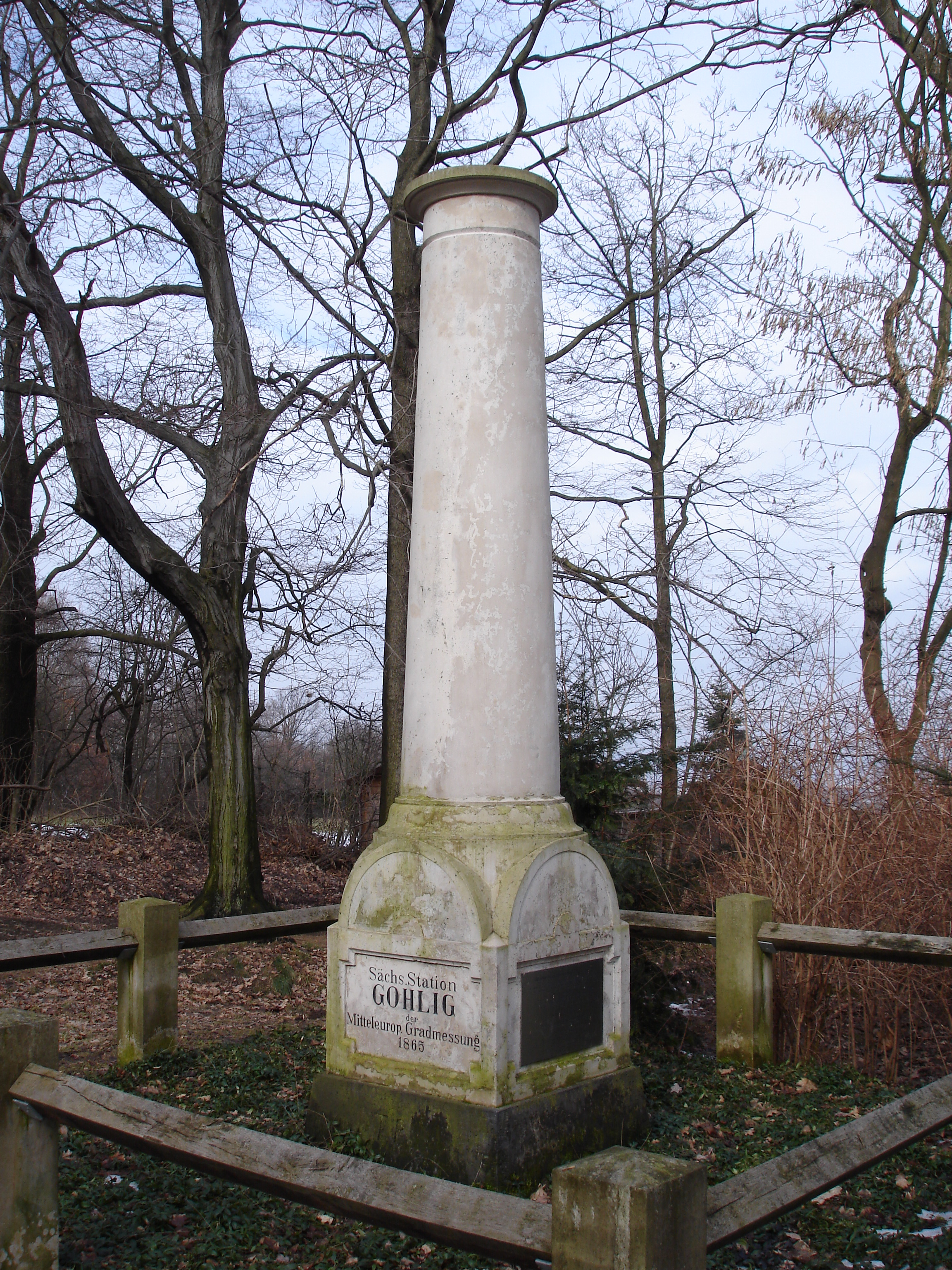 Vermessungspunkt der Mitteleuropäischen Gradmessung auf dem Gohlig, Gemeinde Bannewitz, Sachsen